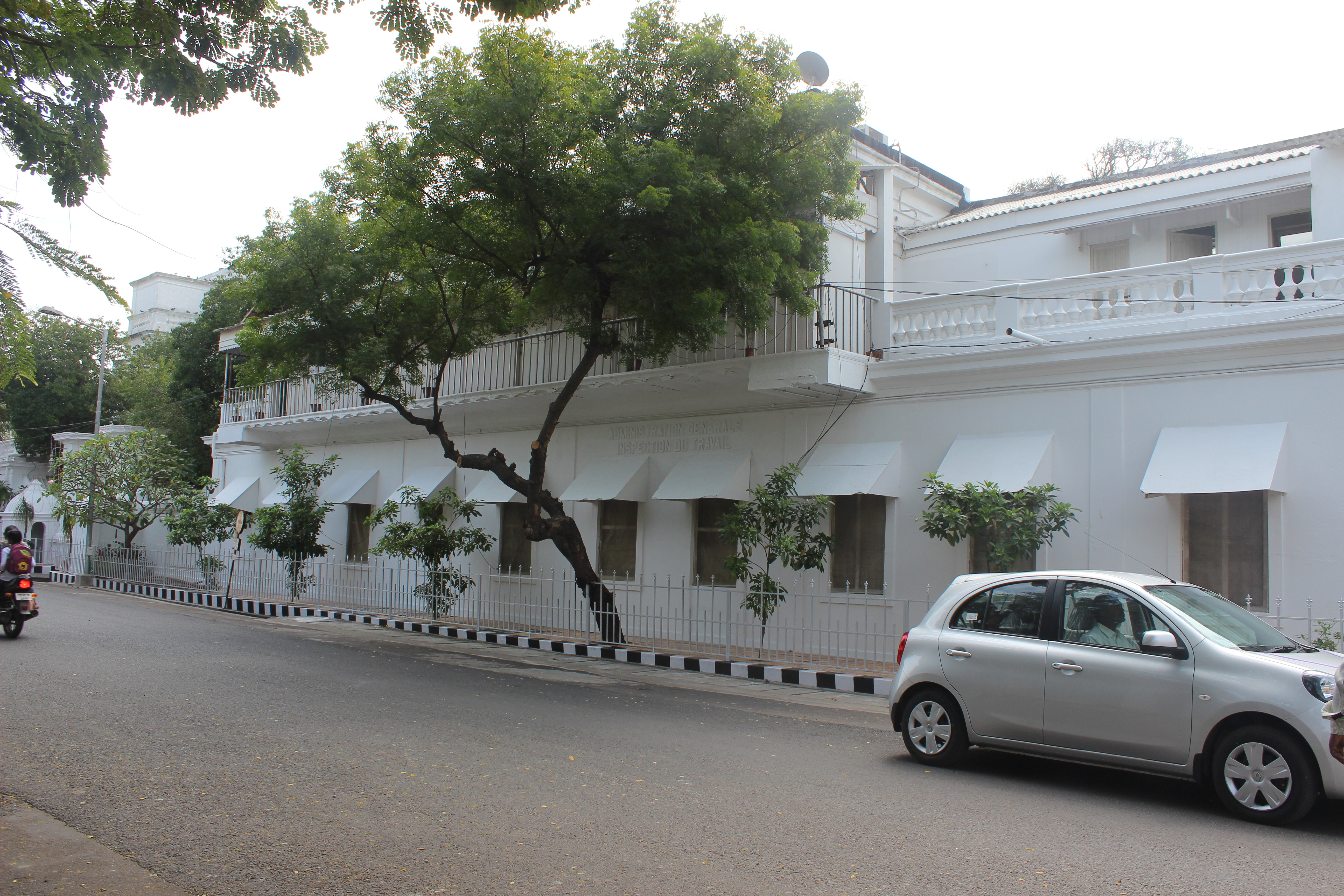 ஓயிட் டவுன், புதுச்சேரி